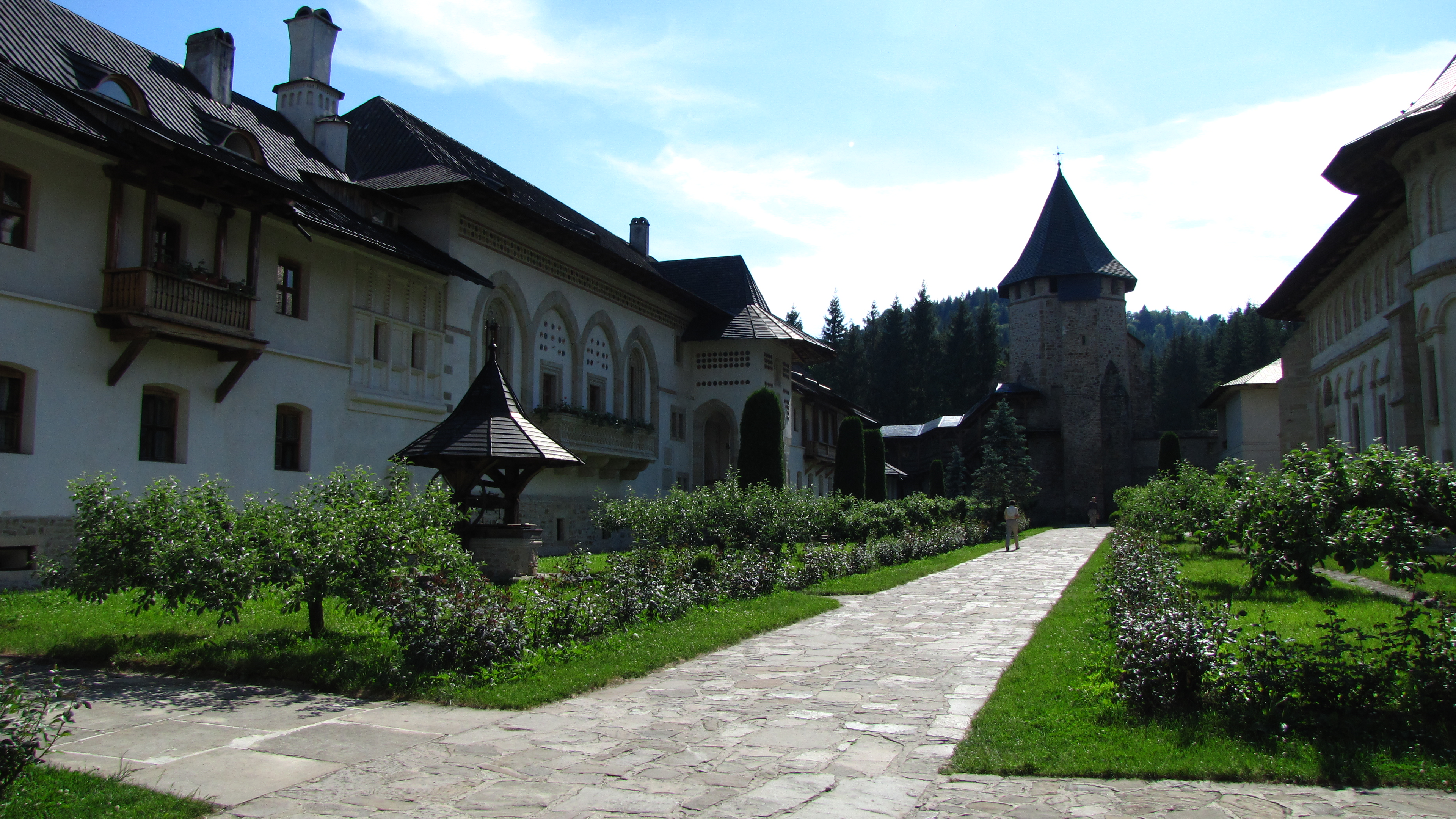 Manastirea Putna - Turnul tezaurului (singura parte ramasa din timpul lui Stefan cel Mare)